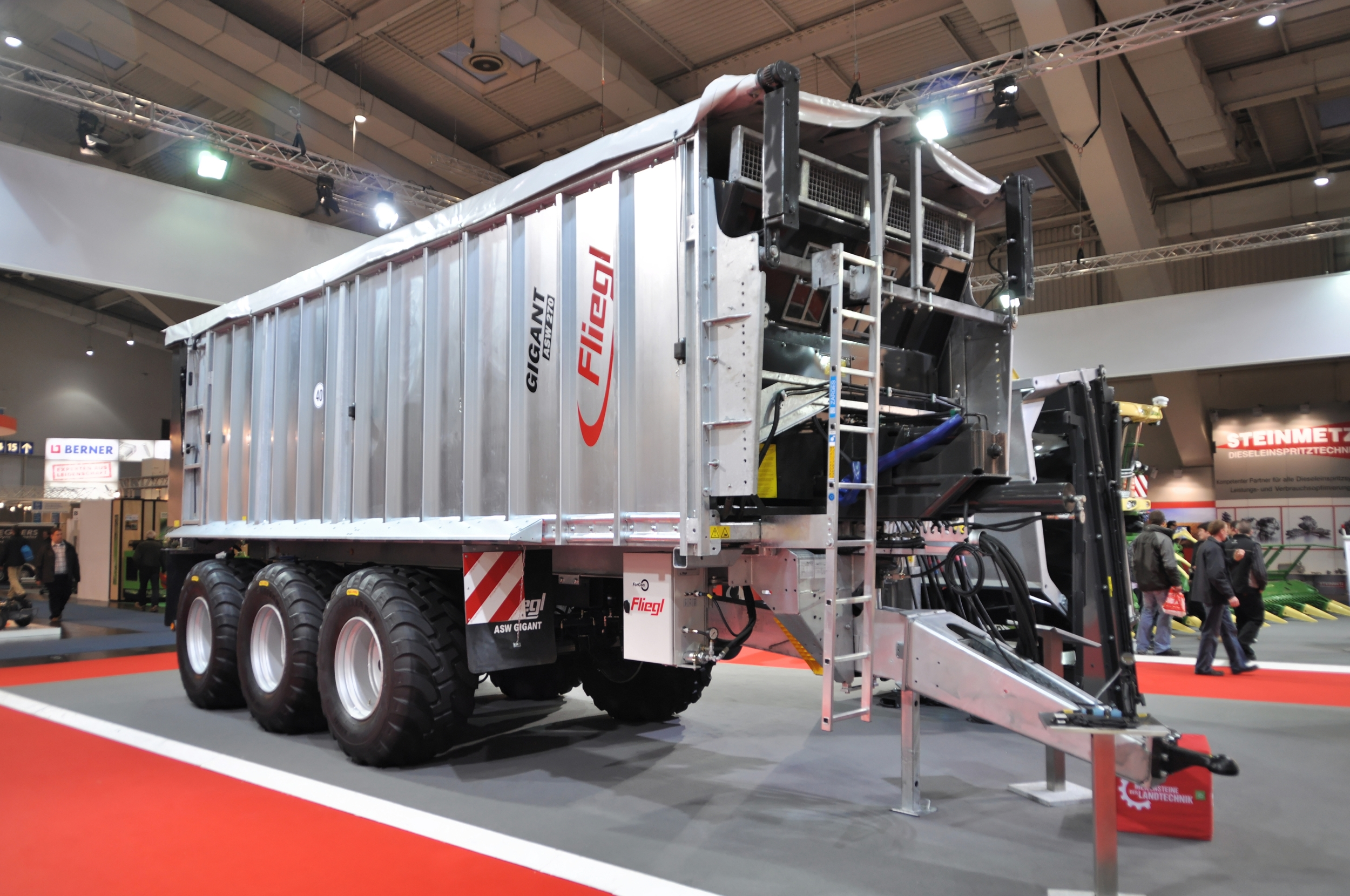 Dreiachsiger Fliegl-Abschiebewagen Gigant ASW 270, Agritechnica 2011 Dieses Foto entstand durch die Mithilfe der Wikimedia Deutschland e. V. bei der Akkreditierung als Fotograf. Wikimedia Deutschland e. V. hilft den Freiwilligen der Wikipedia bei der Erstellung von freien Inhalten.